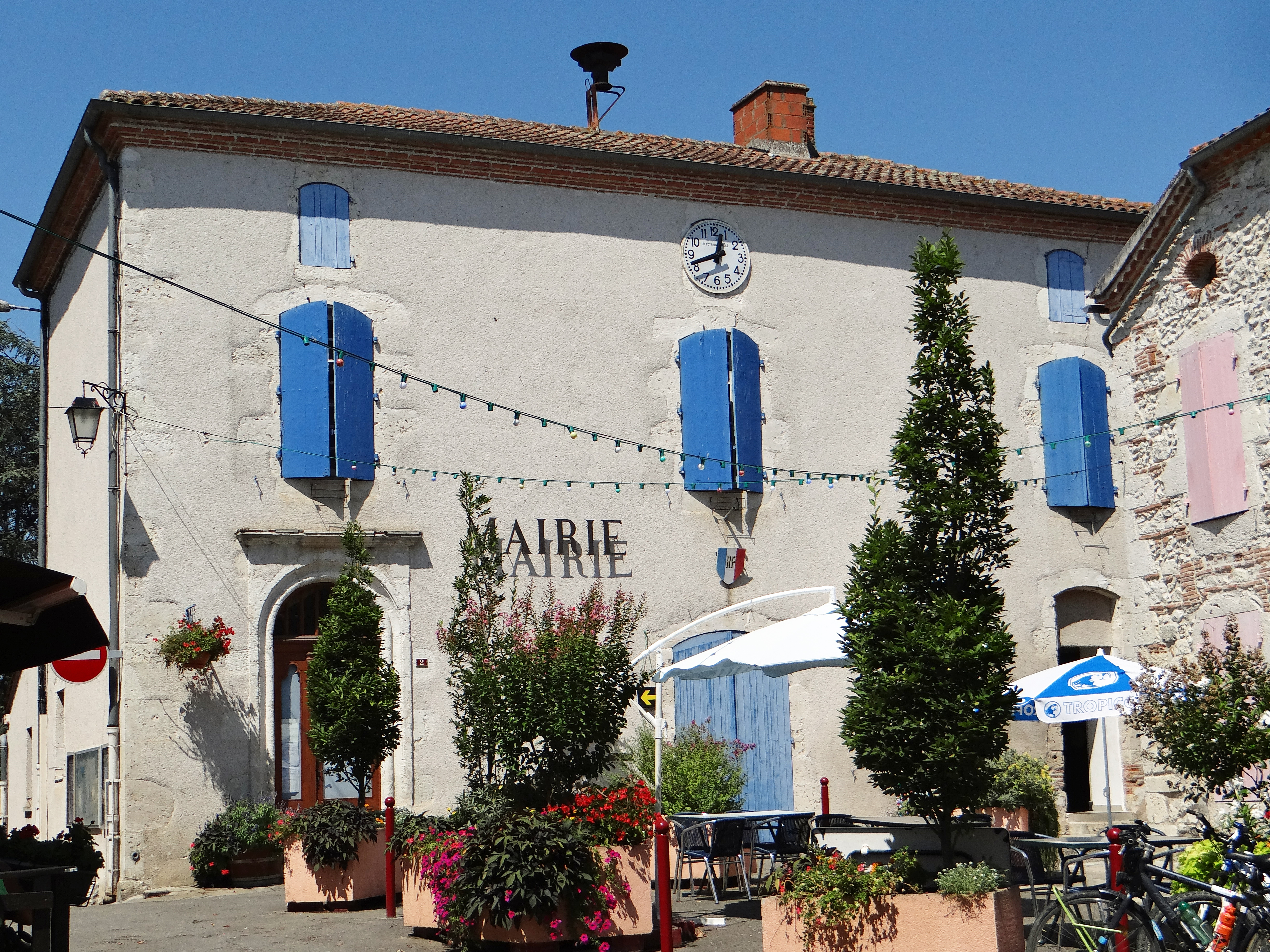 Sérignac-sur-Garonne - Mairie